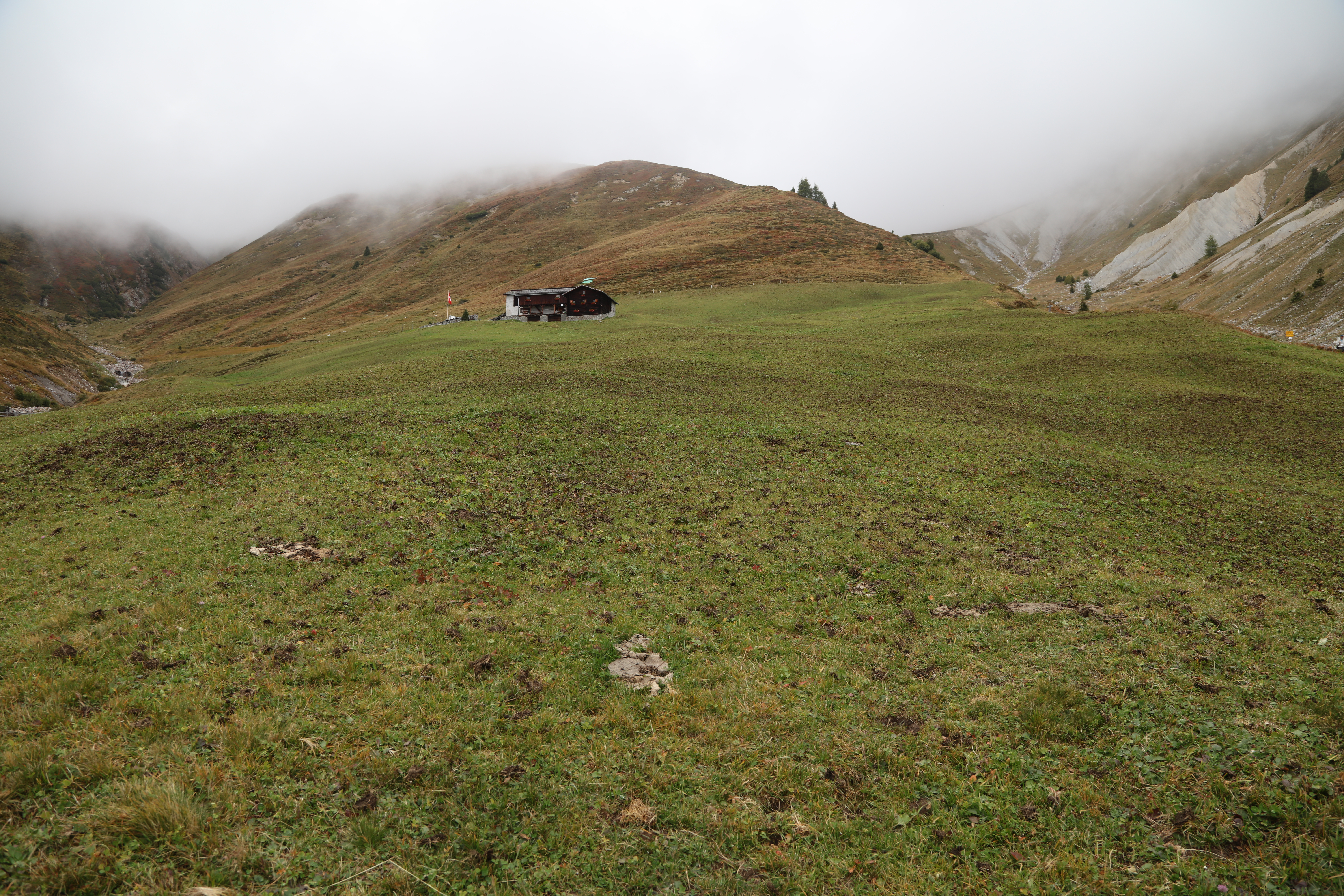 Die Lochalp oberhalb Davos Platz